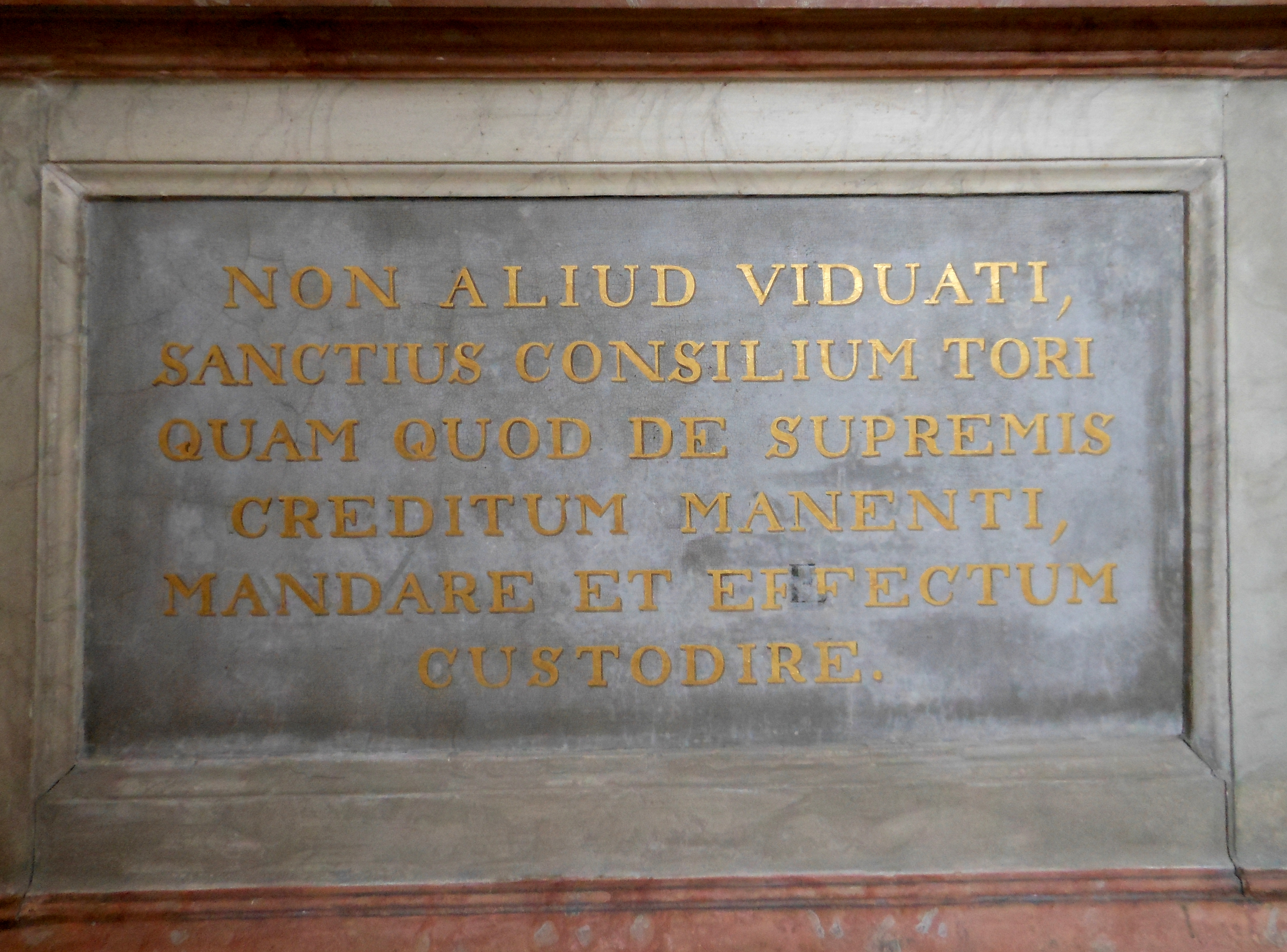 Stadthagen, Fürstenmausoleum, Epitaph 4, Basis